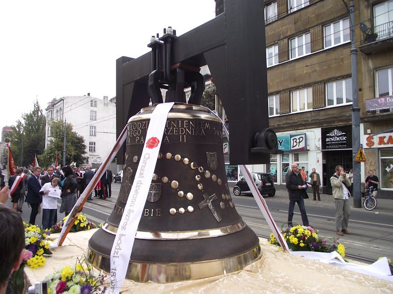 Uroczystości związane z umieszczenien na dzwonnicy katedry łódzkiej nowego dzwona - nazwanego Sercem Łodzi